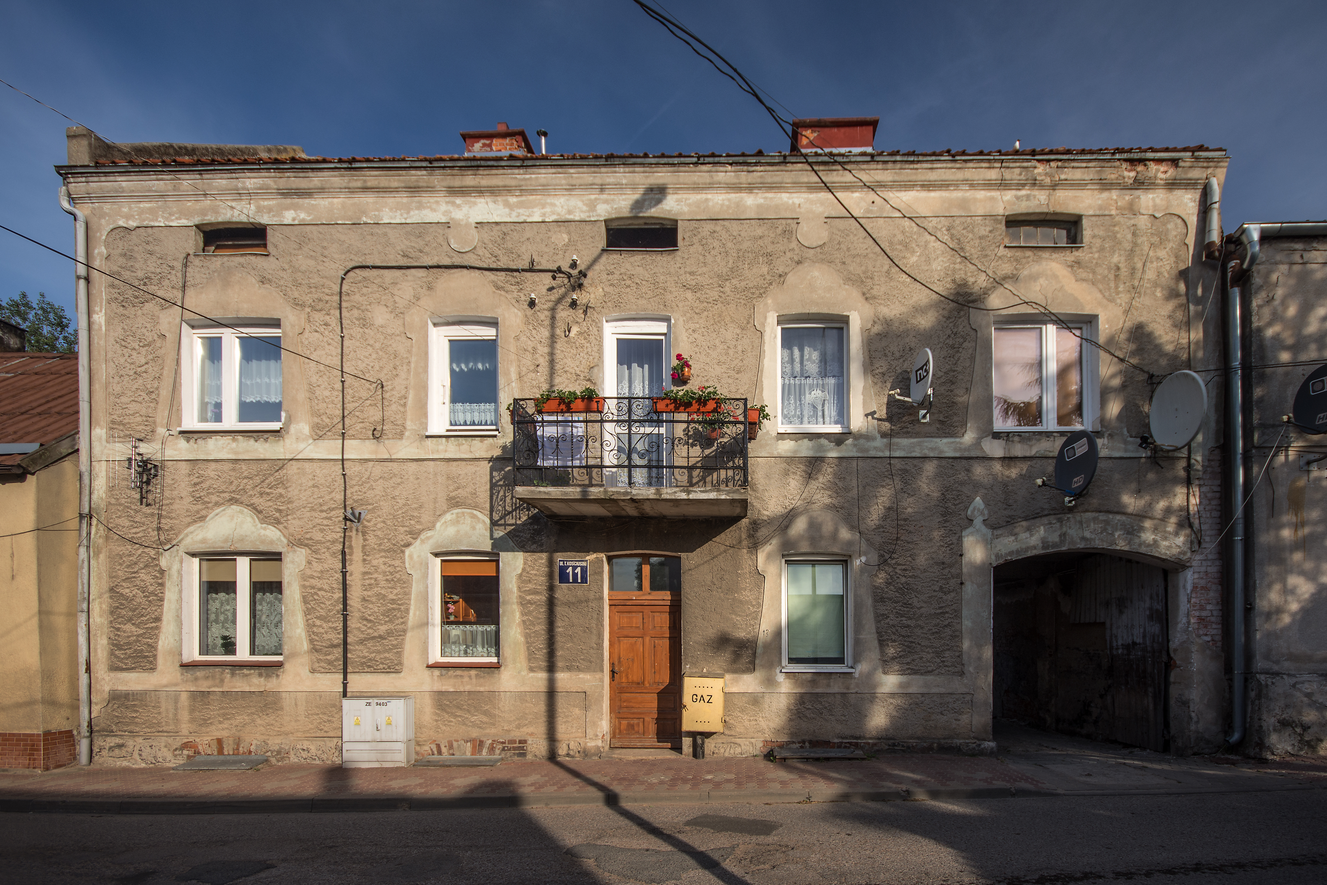 Ryn, dom, 1916